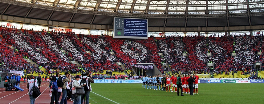 Перфоманс "Тихонов" из воздушных шариков на матче с "Крыльями Советов", который стал прощальным для Андрея Тихонова. 2011 год